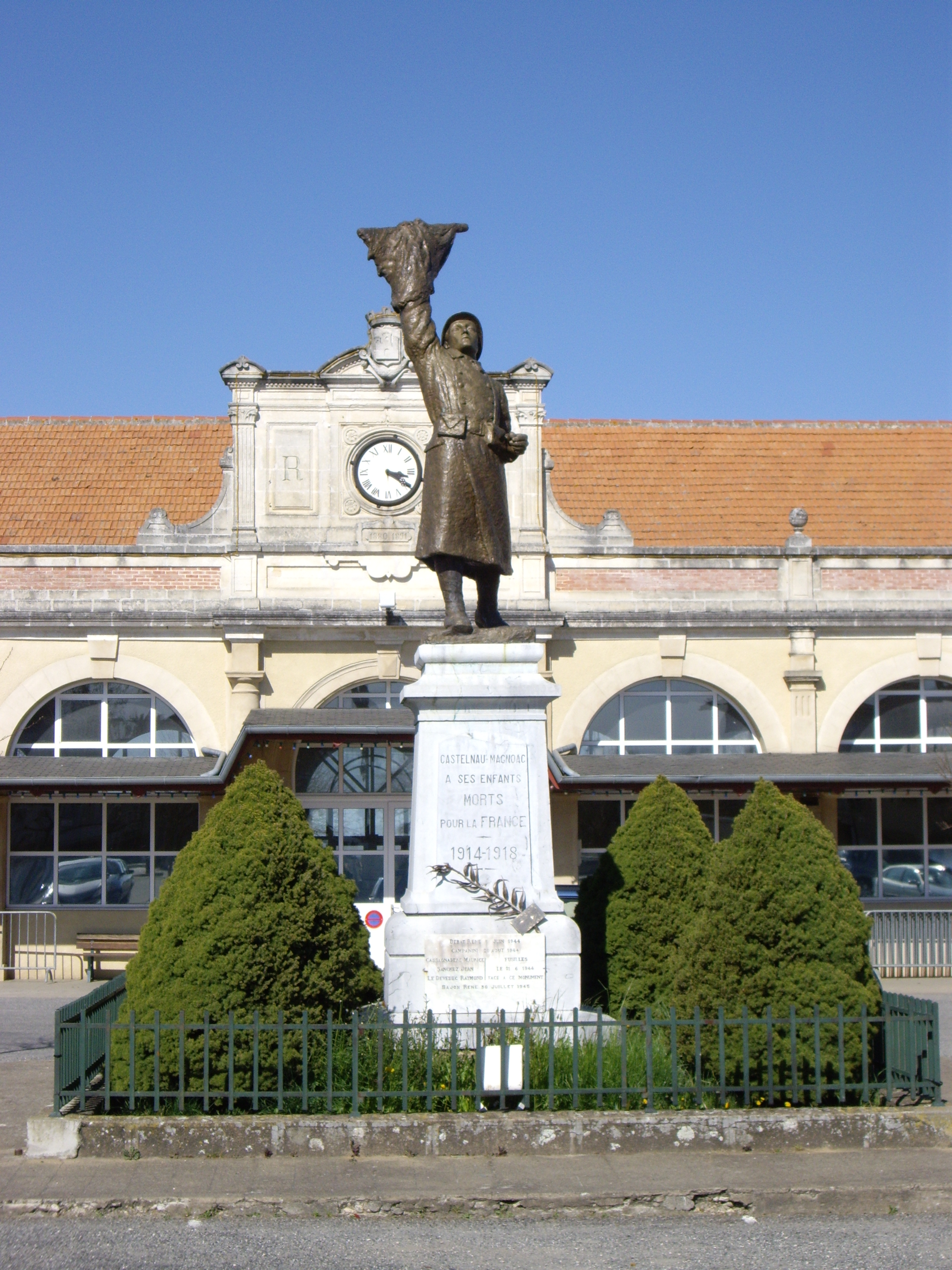 Monument aux morts sur la place de la Pourcaou à Castelnau-Magnoac (Hautes-Pyrénées, France)